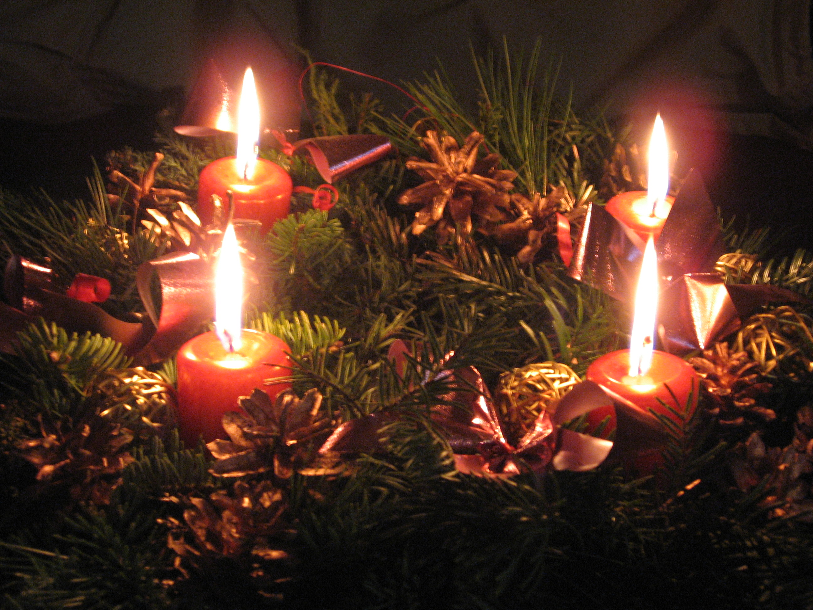 Adventný veniec II